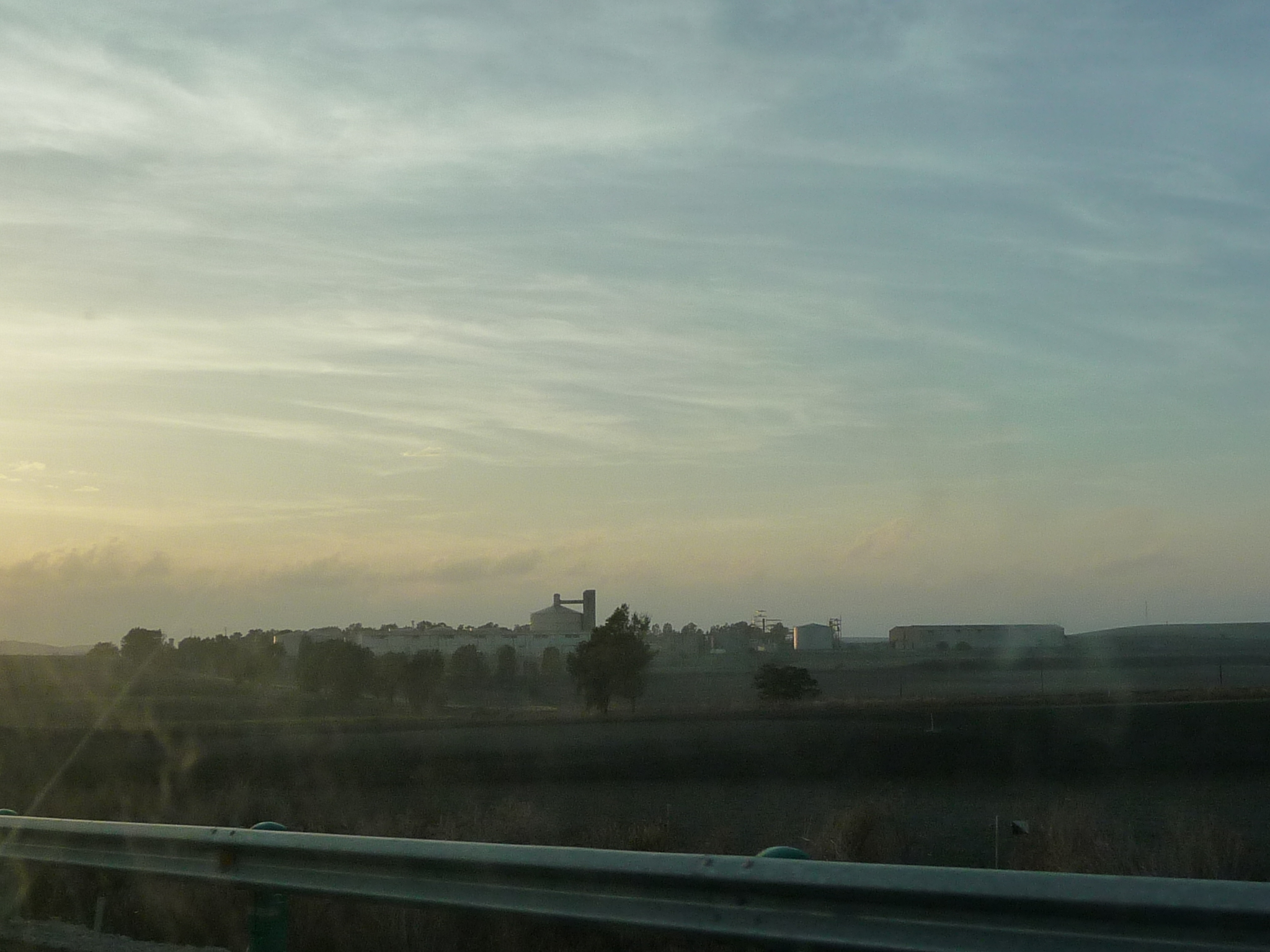 Jedula-P1050289.JPG